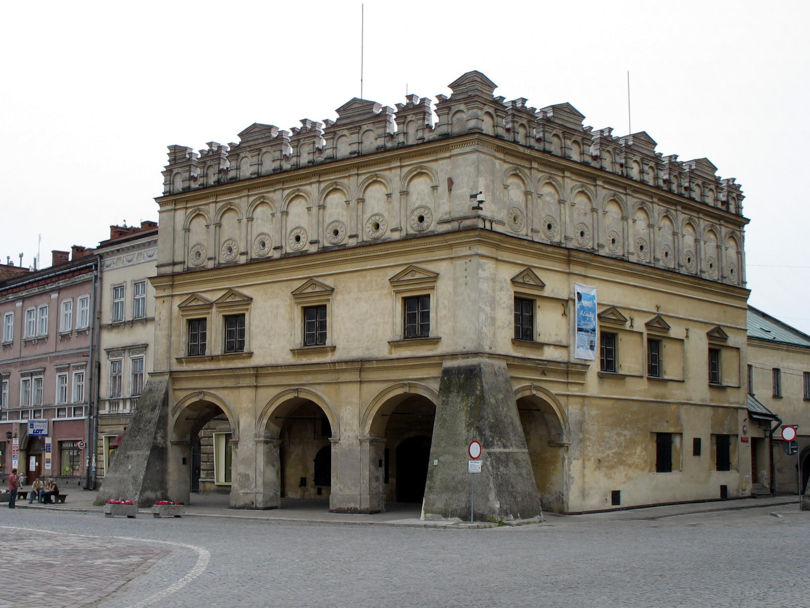 Jarosław (Poland), kamienica Orsettich